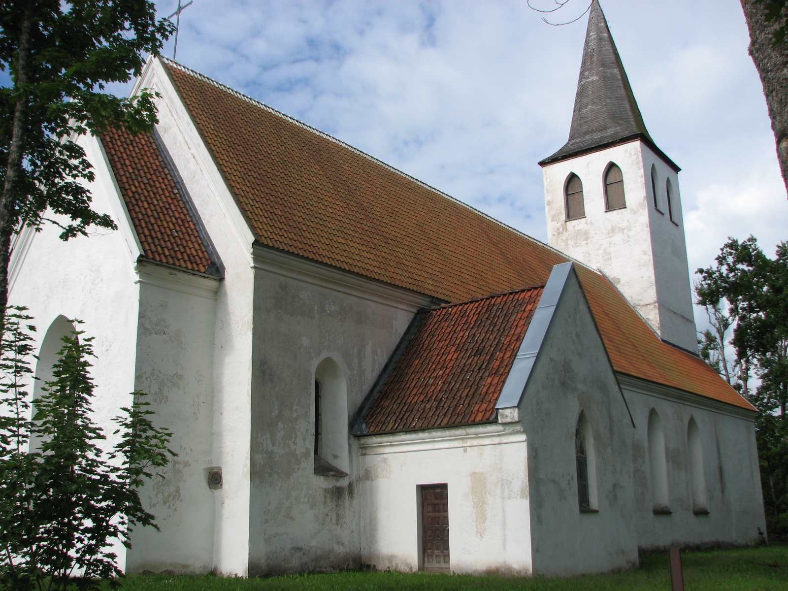 Pühalepa Church, Pühalepa, Hiiumaa, Estonia